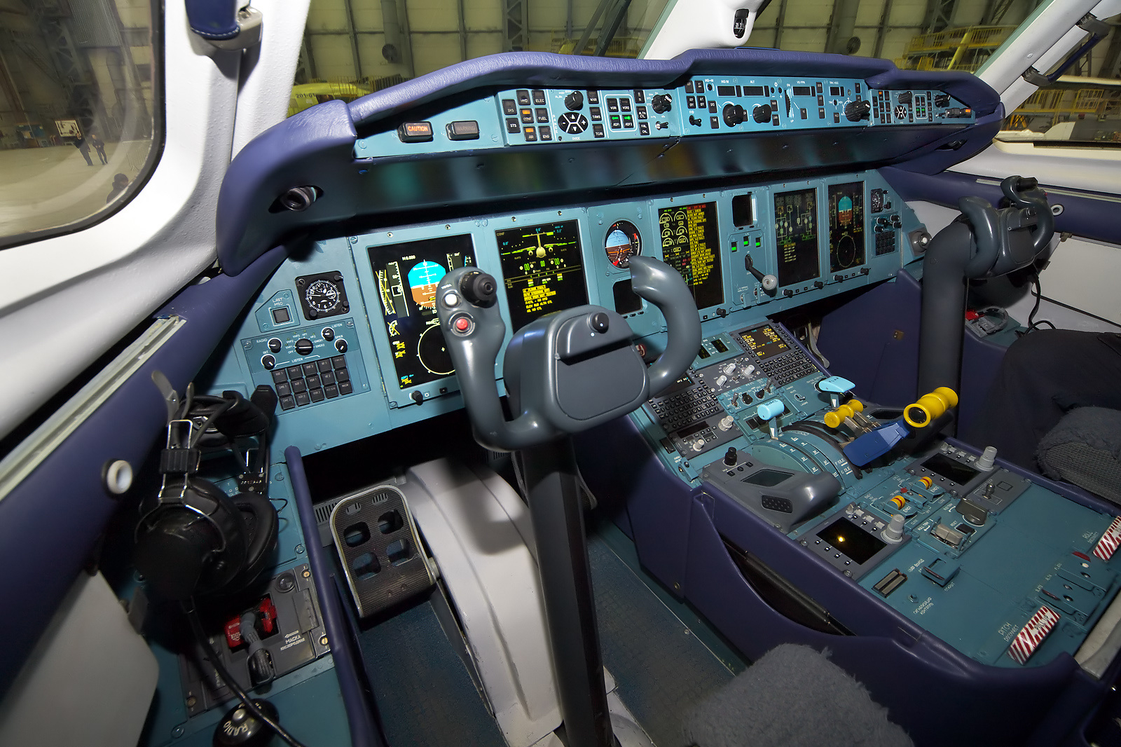 Air Koryo Antonov An-148-100B